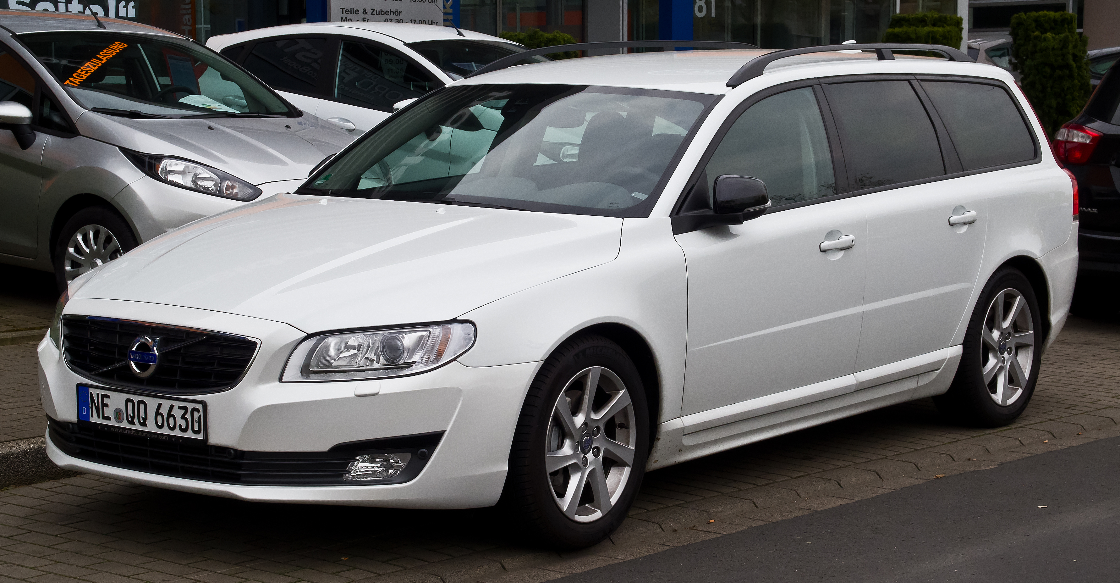 Volvo V70 D3 Linje Svart